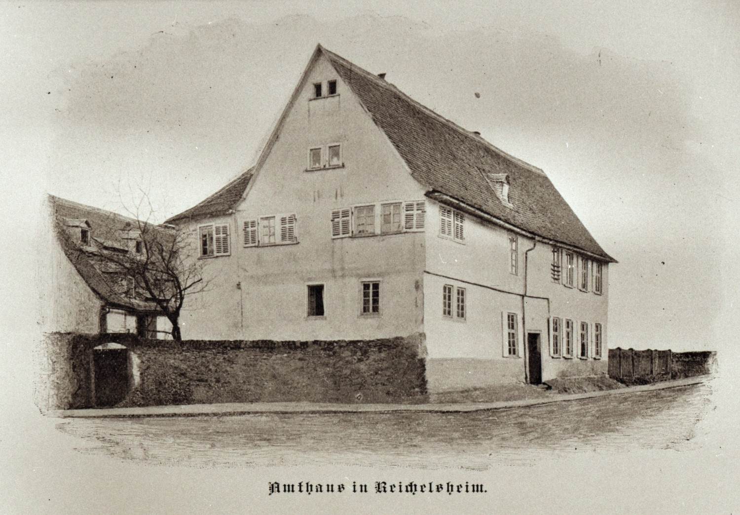 altes Amtshaus in Reichelsheim (Wetterau) gebaut um 1500, abgerissen 1910/11